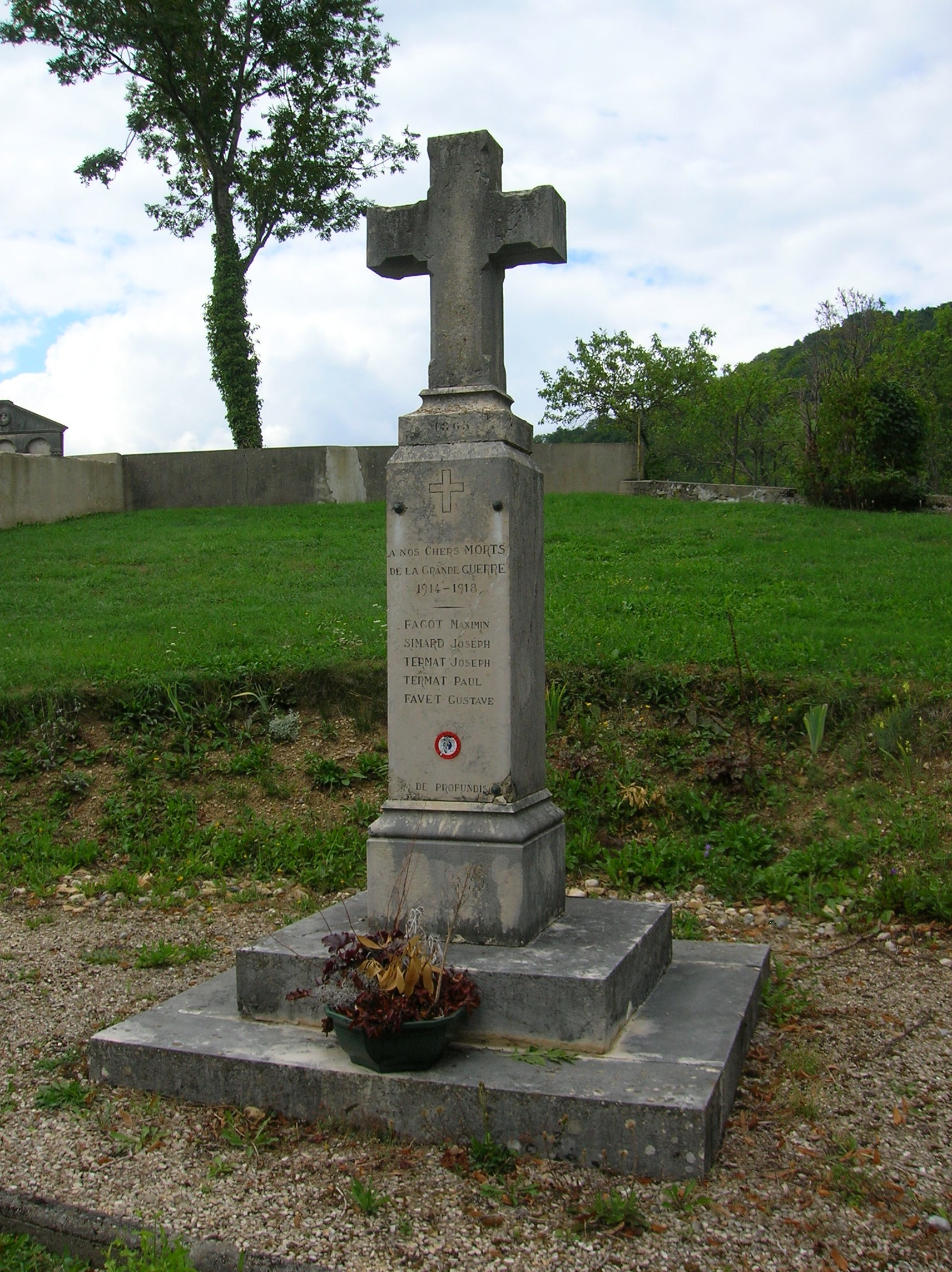 monument aux morts, Mont-Saint-Martin, Isère